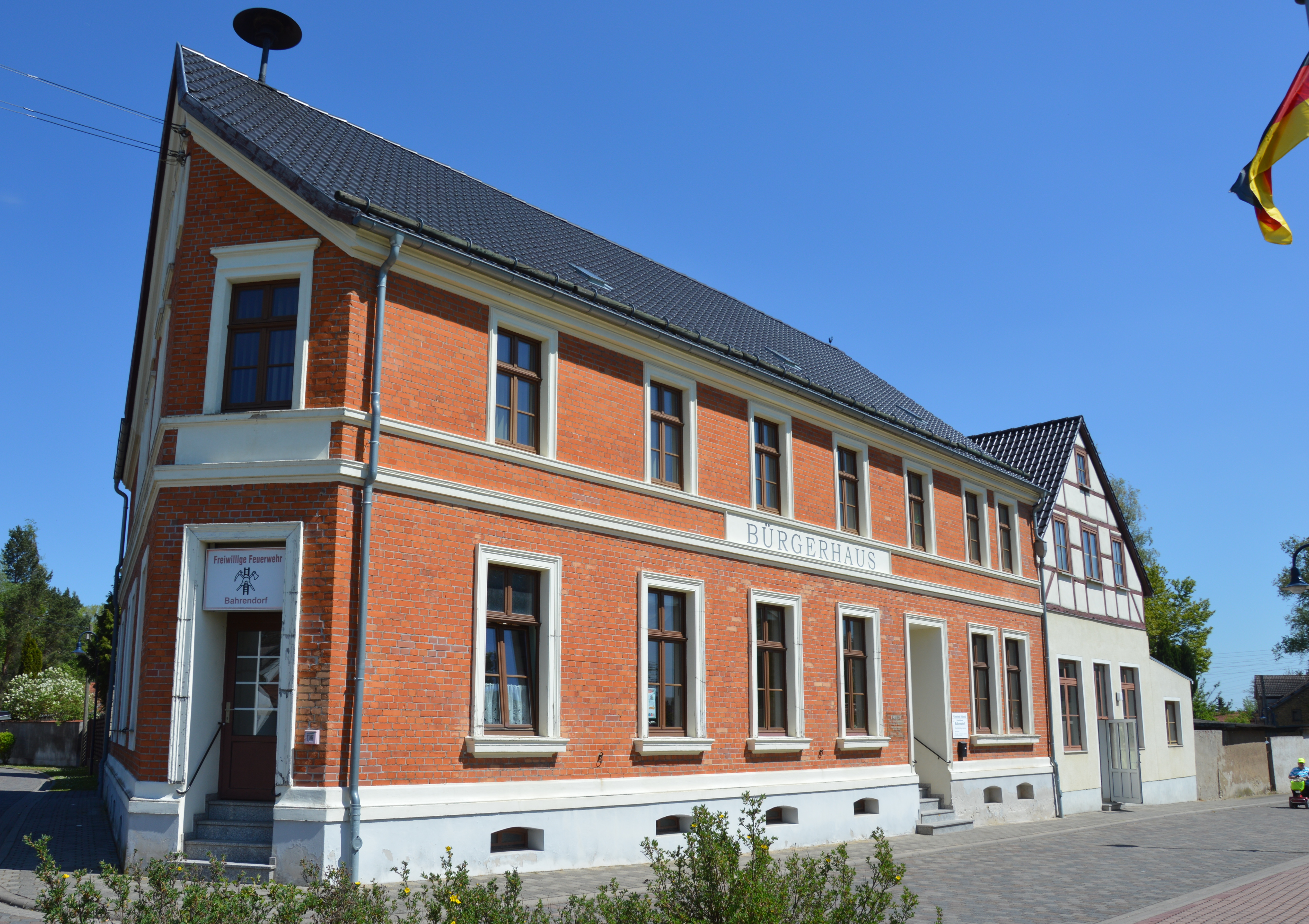 Bürgerhaus Bahrendorf